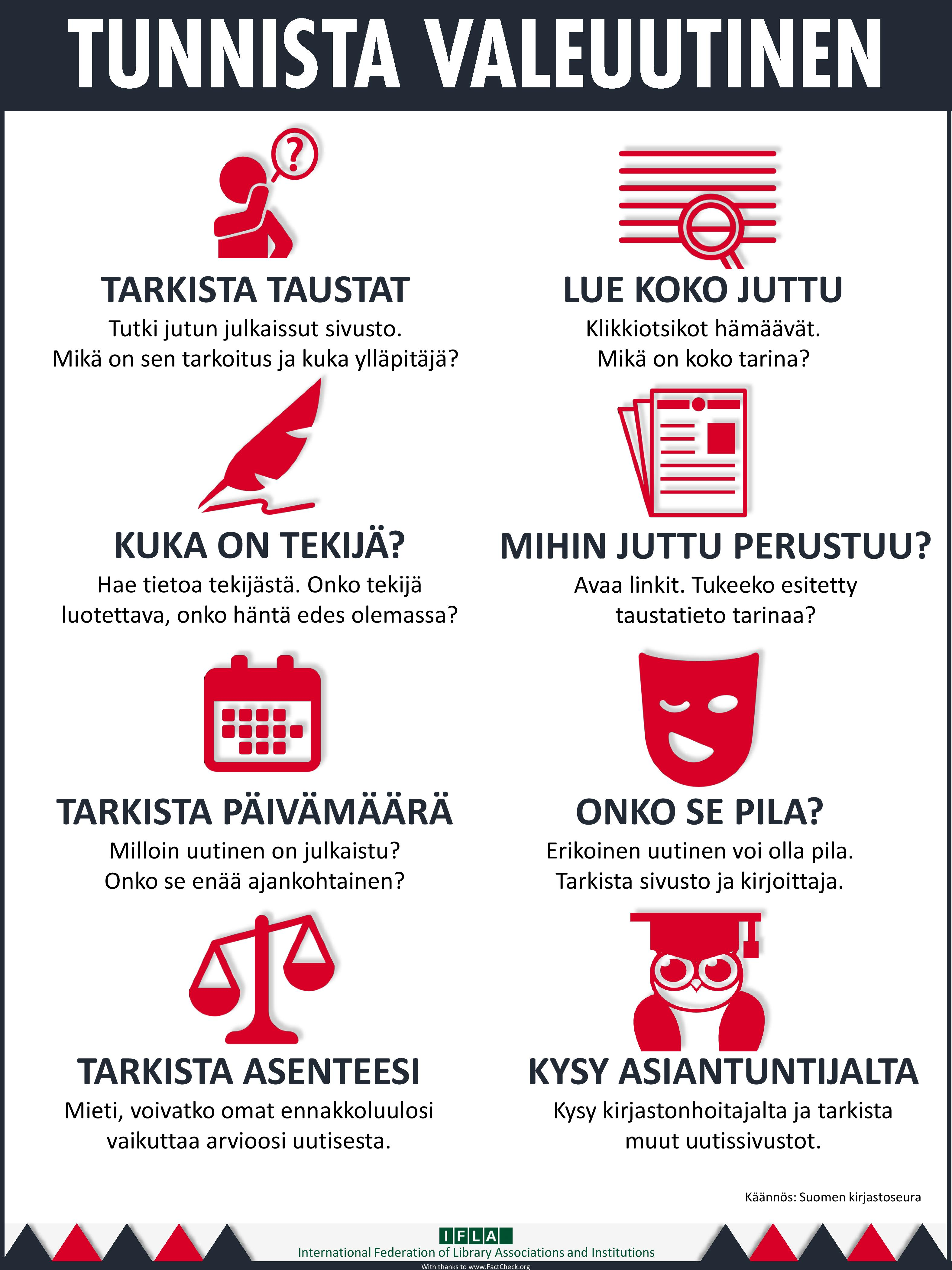 Tunnista valeuutinen, käännös: Suomen kirjastoseura